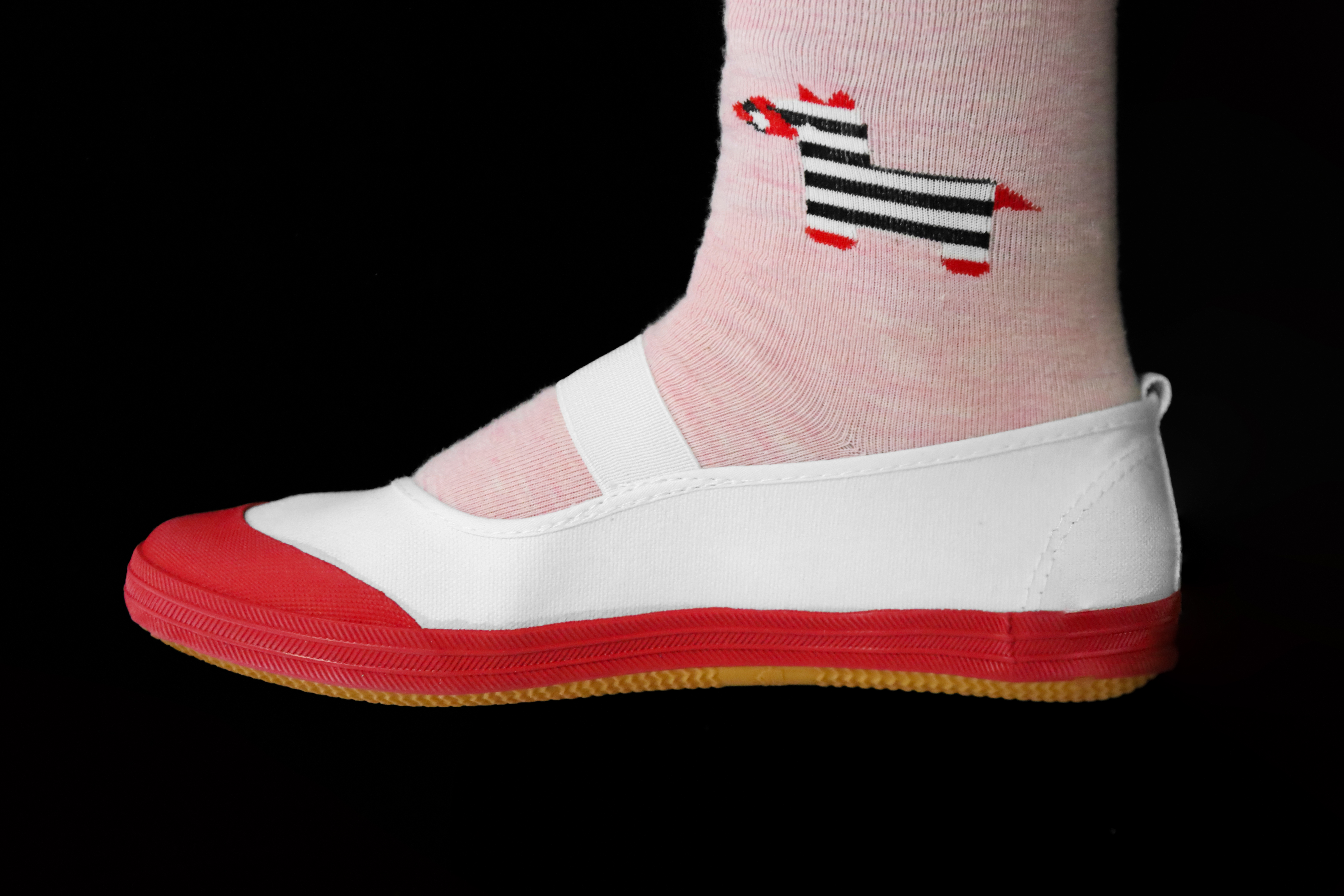 中文（中国大陆）: 红色室内鞋